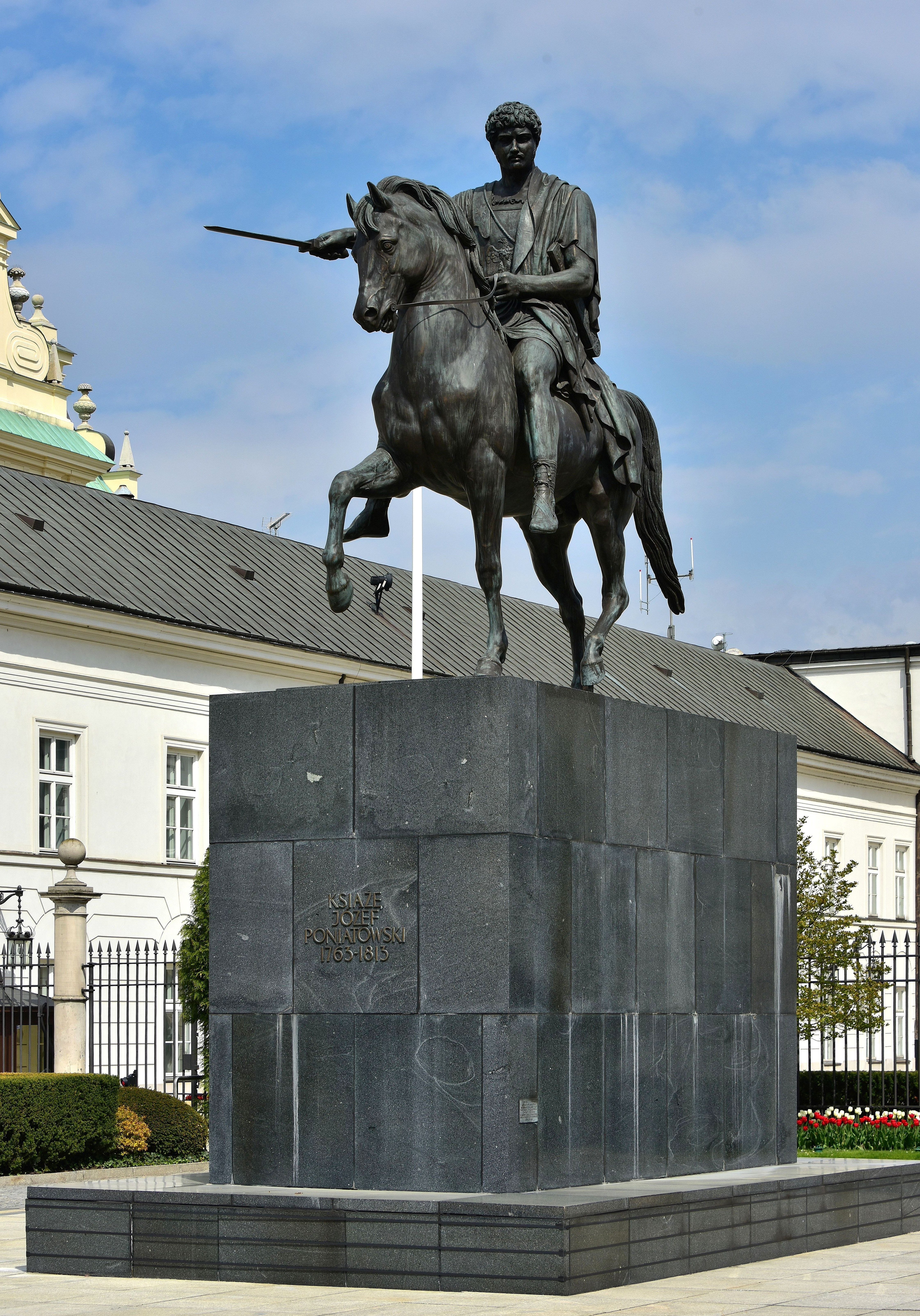 Pomnik Księcia Józefa Poniatowskiego przed Pałacem Prezydenckim w Warszawie